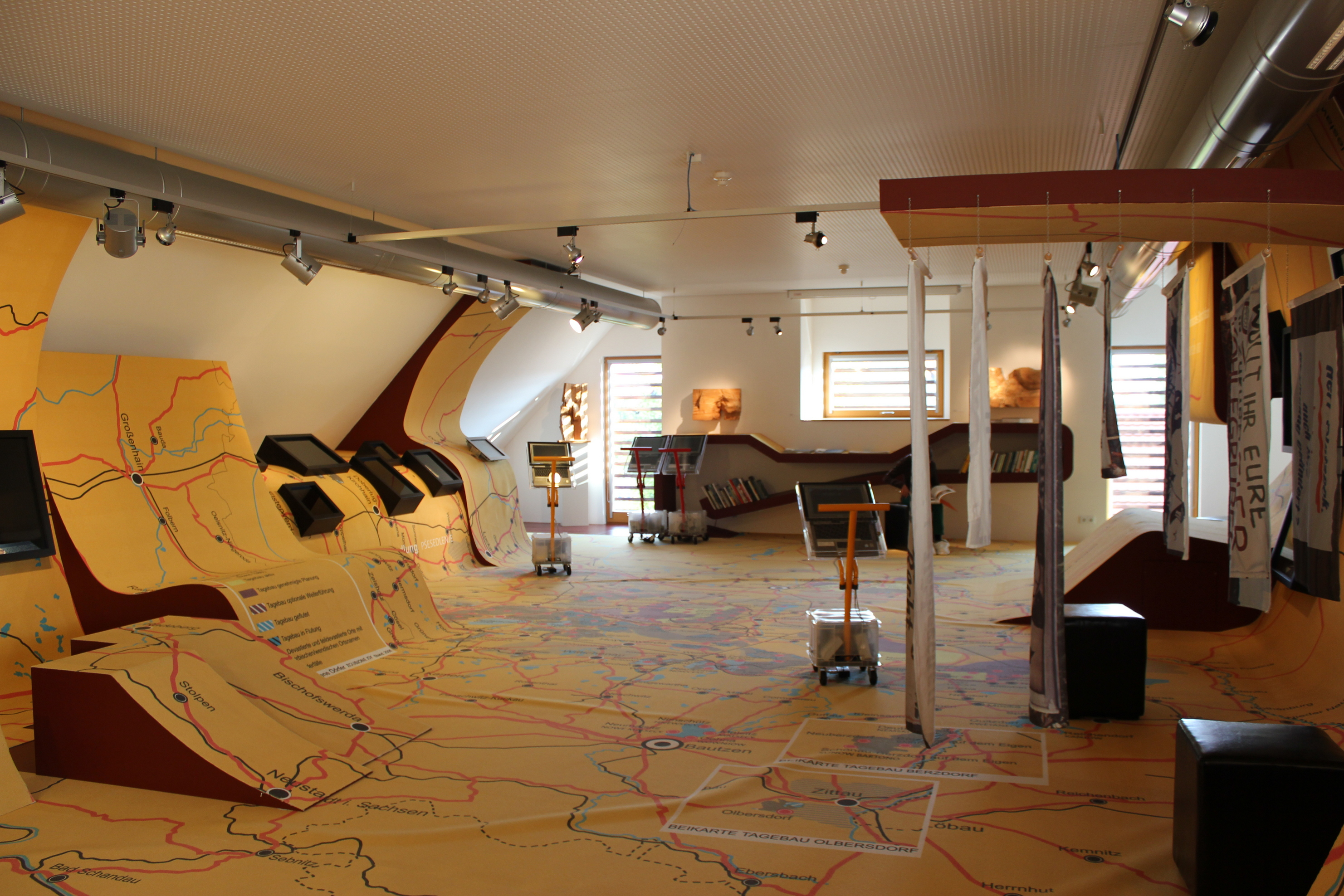 Hornjoserbsce: Archiw zhubjenych wsow w Rogowje.